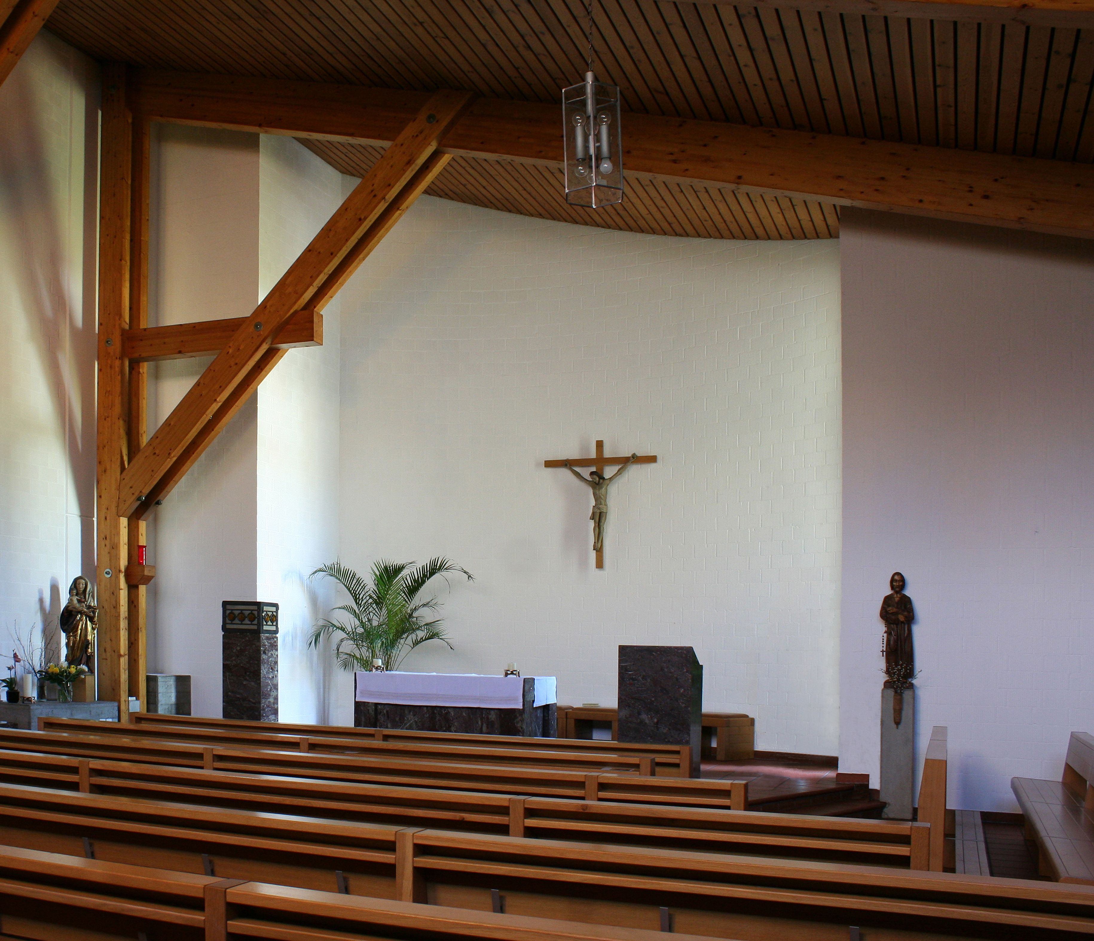 Römisch-katholische Pfarrkirche Bruder Klaus Bäretswil, Innenansicht